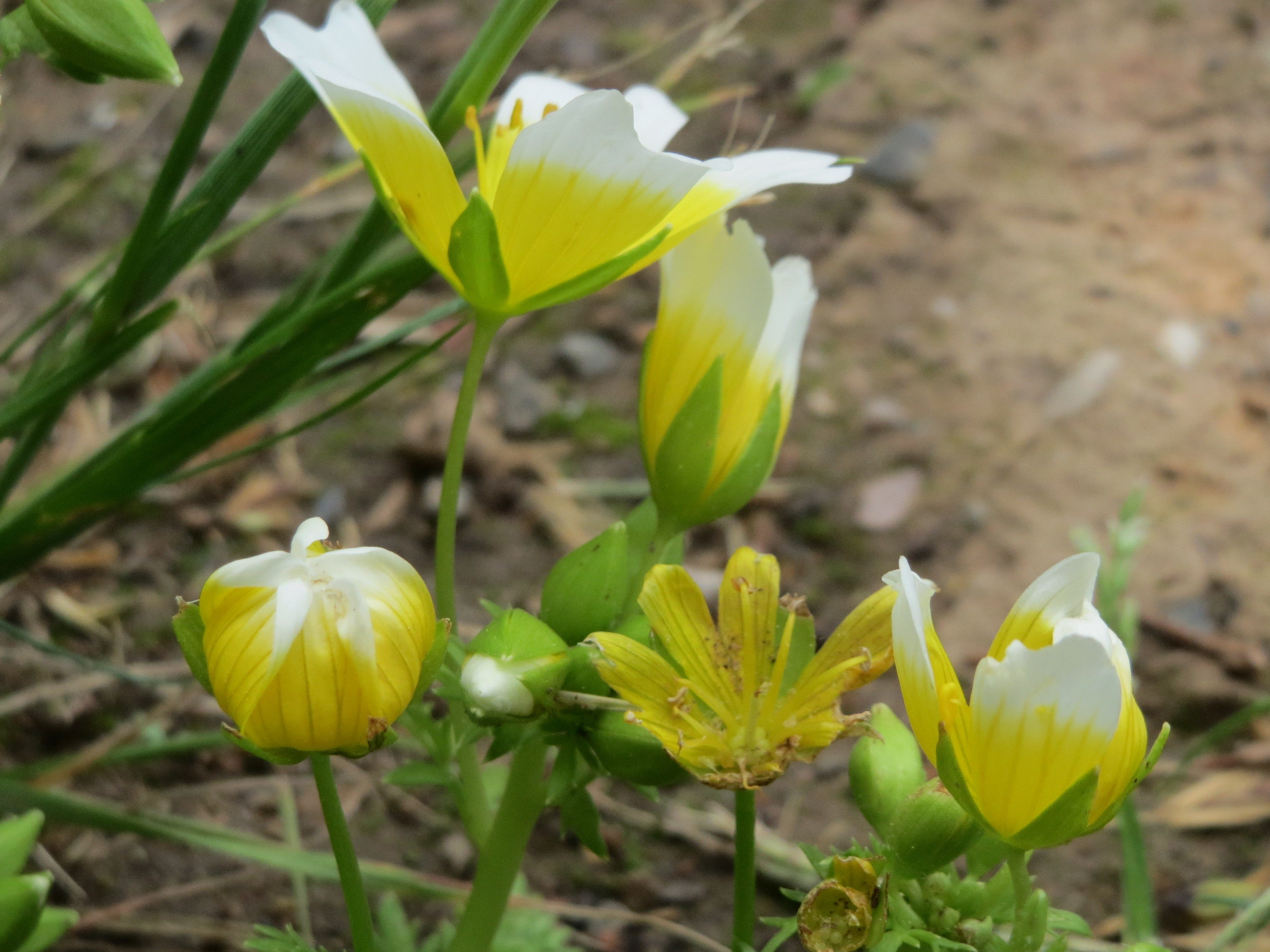 Douglas-Sumpfblume (Limnanthes douglasii) an der Saar in Saarbrücken